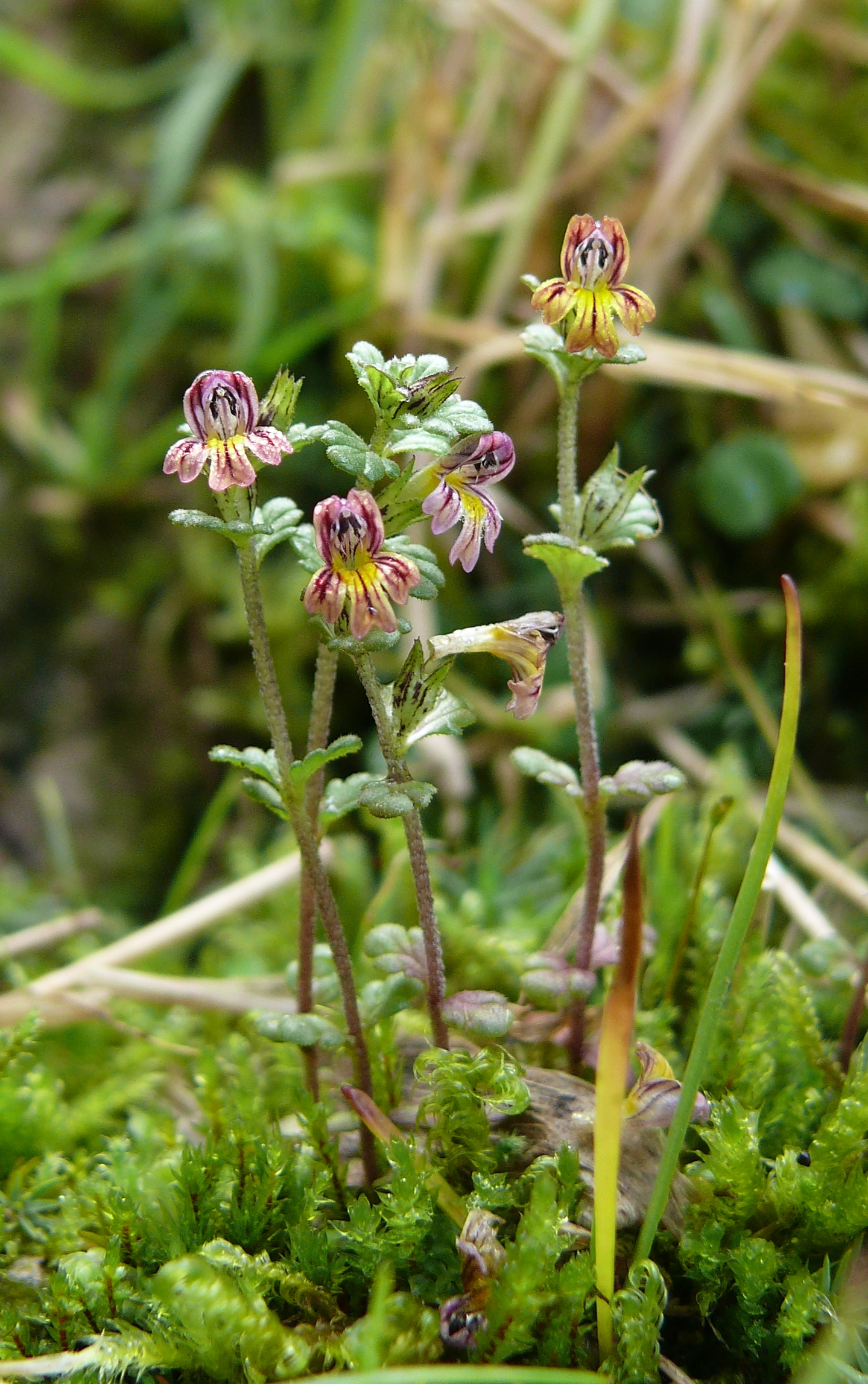 Euphrasia hirtella, Allgäuer Alpen, Deutschland